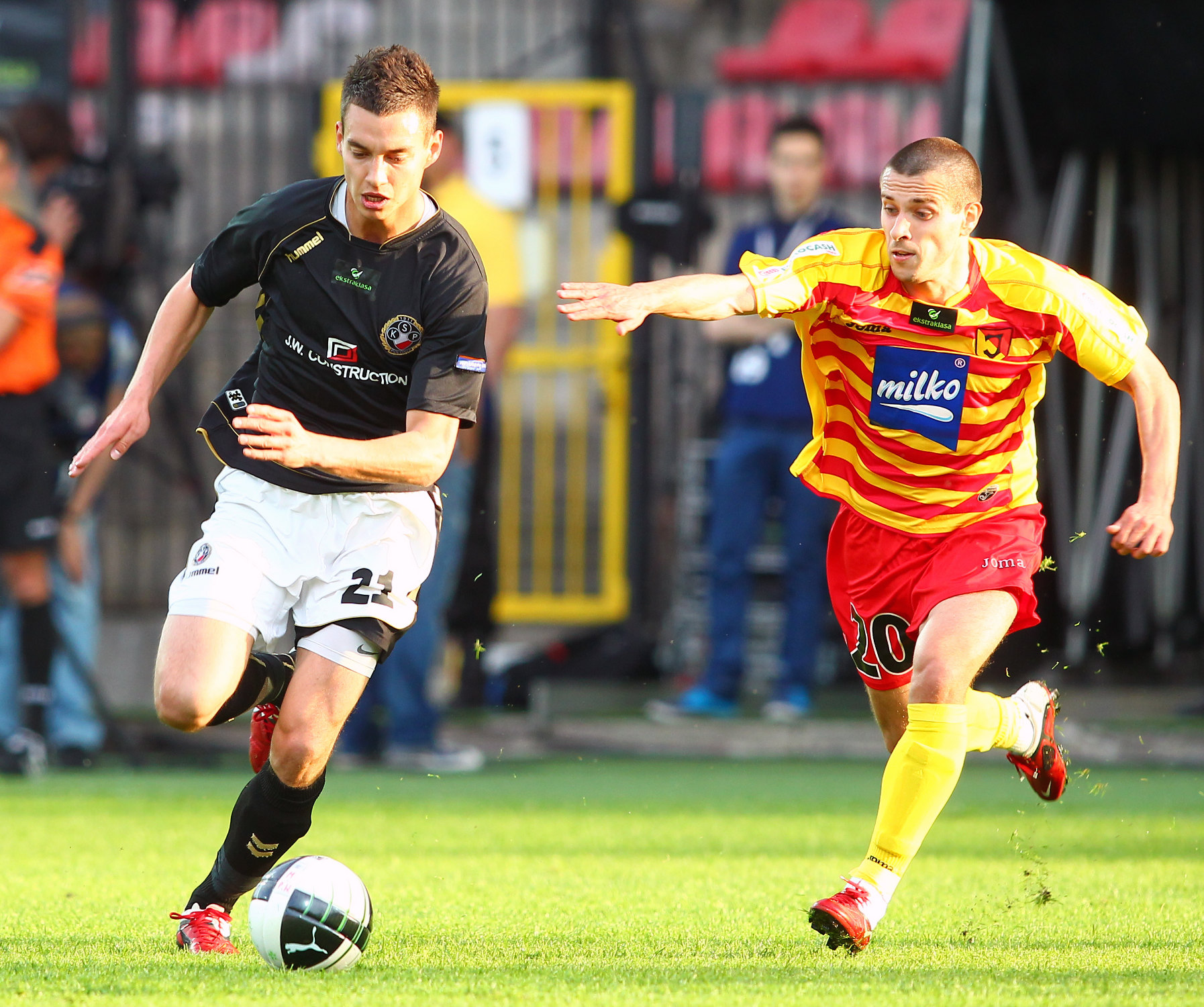 Maciej Makuszewski (right, No 20) of Jagiellonia Białystok tries to stop Maciej Sadlok (left, No 21) of Polonia Warszawa in an Ekstraklasa match